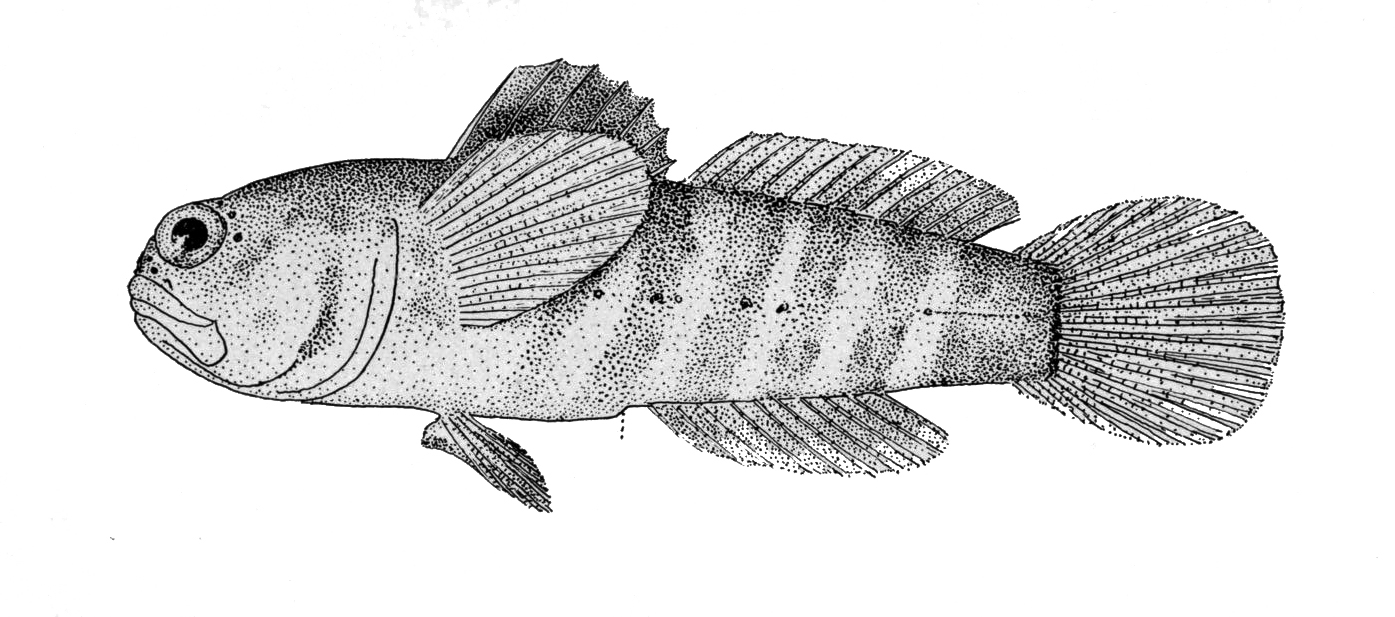 Gobiosoma nudum